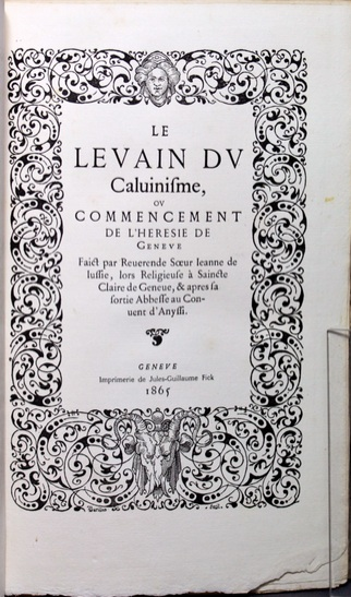 Première page du livre: "Le Levain du Calvinisme ou le commencement de l’hérésie de Genève"